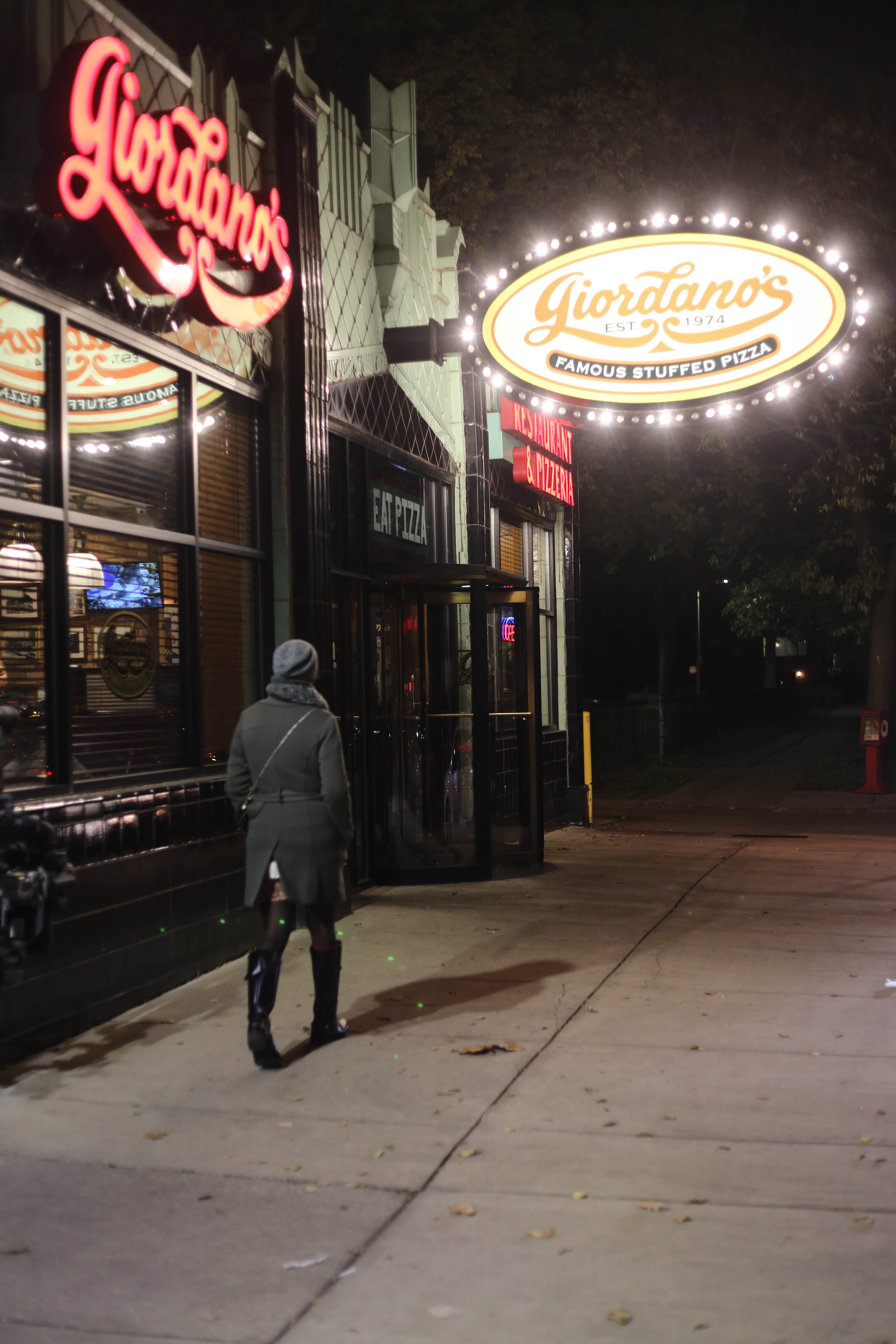 Giordano's Famous Stuffed Pizza